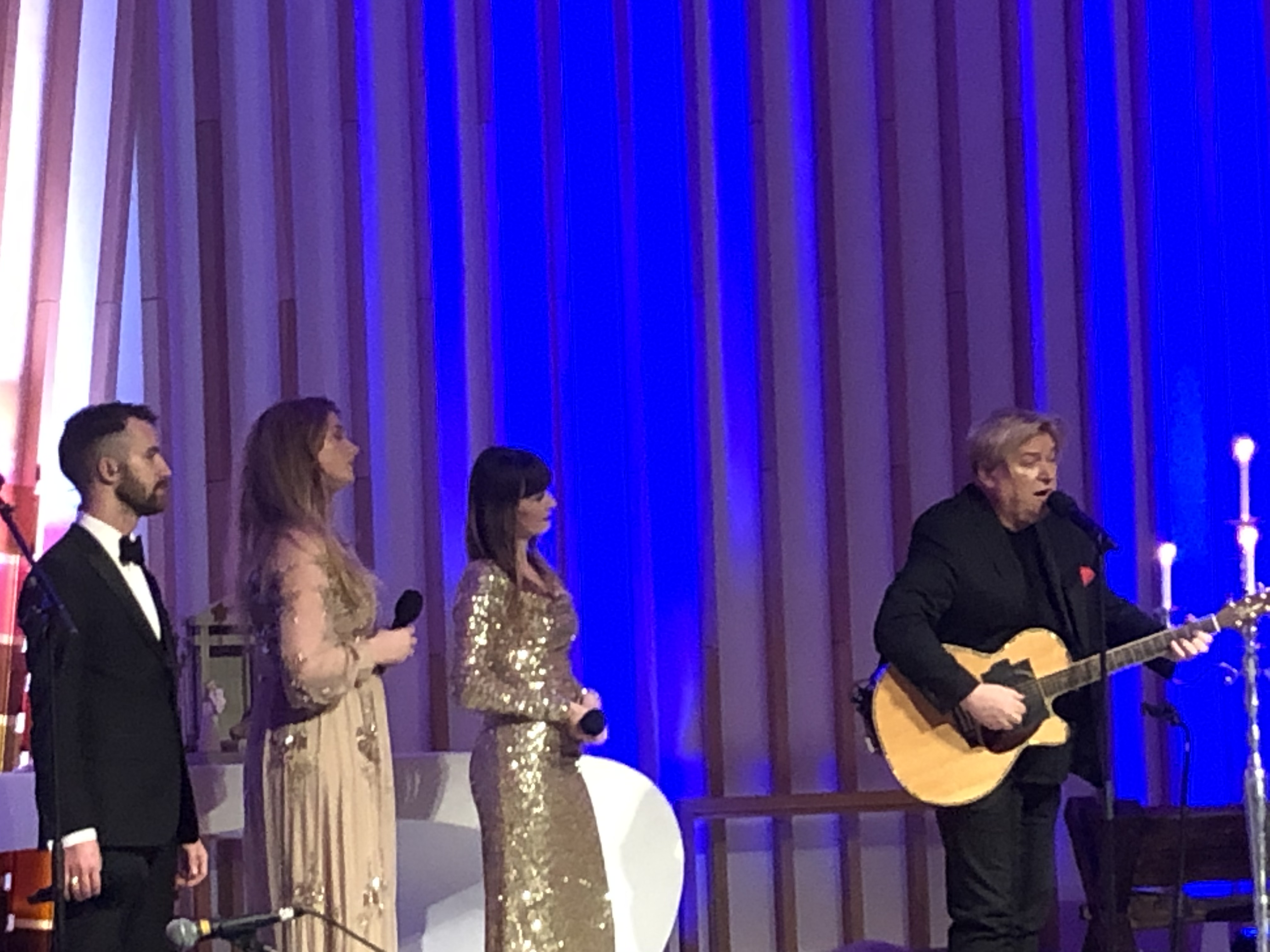 Emil Solli-Tangen - Lise Mæland - Lisa Stokke - Jørn Hoel i Hønefoss kirke 2019